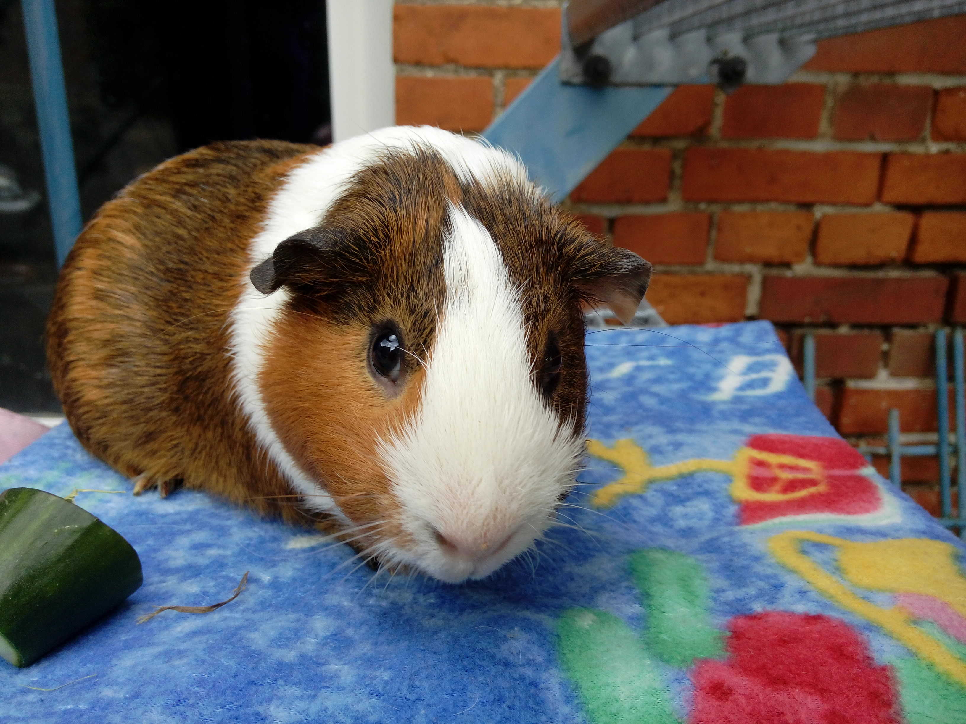 Erwachsenes männliches Glatthaar-Meerschweinchen